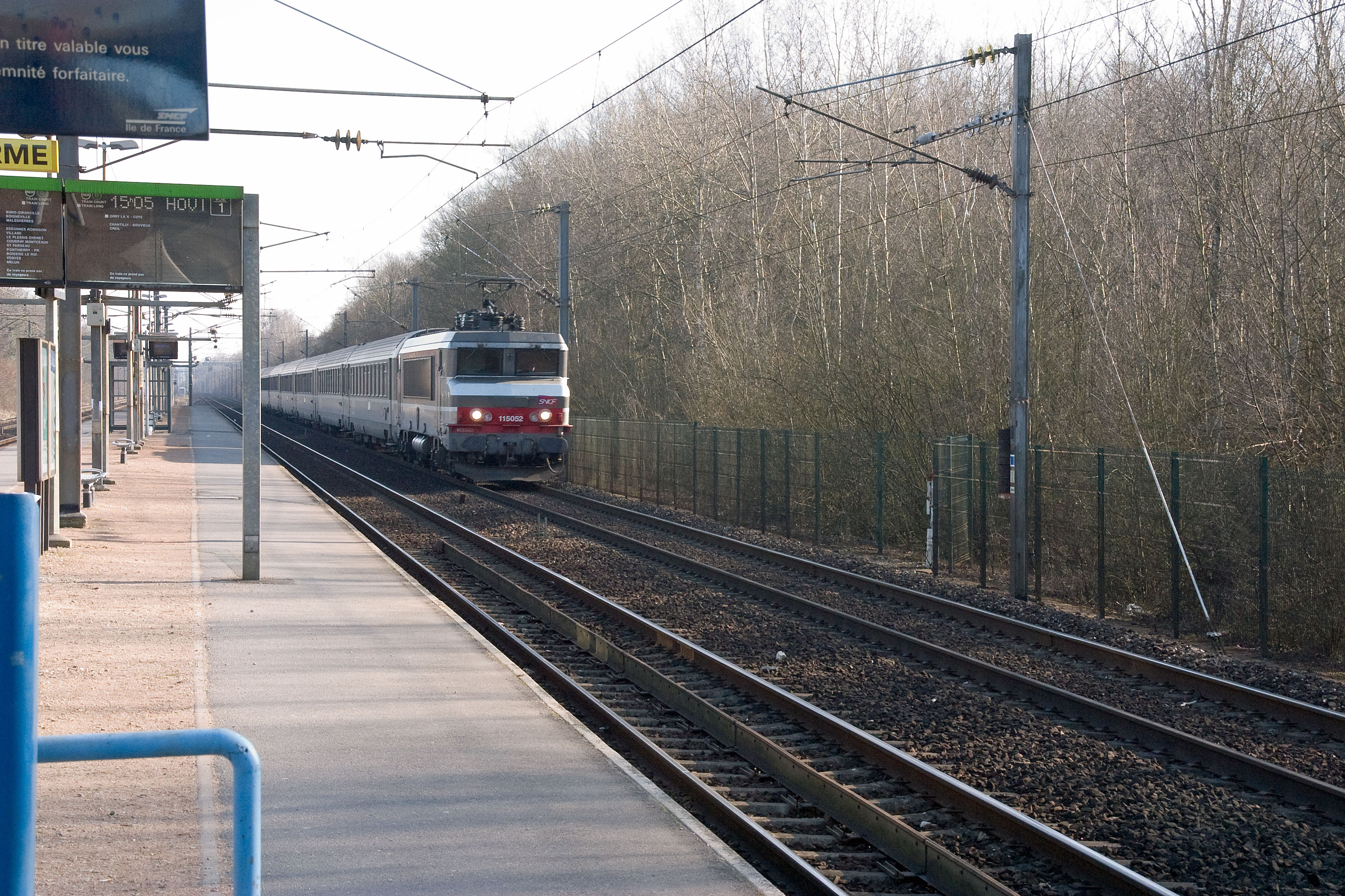 Gare de La Borne Blanche - Orry-la-Ville, département de l'Oise (France)